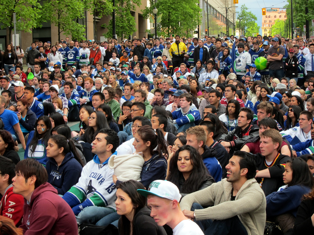 Vancouver Canucks Game 1